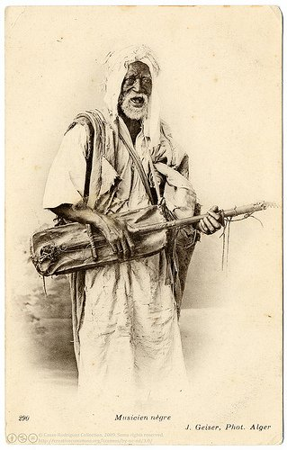 « Musicien nègre » (vers 1906 à Alger), de Jean Geiser (1848-1923)